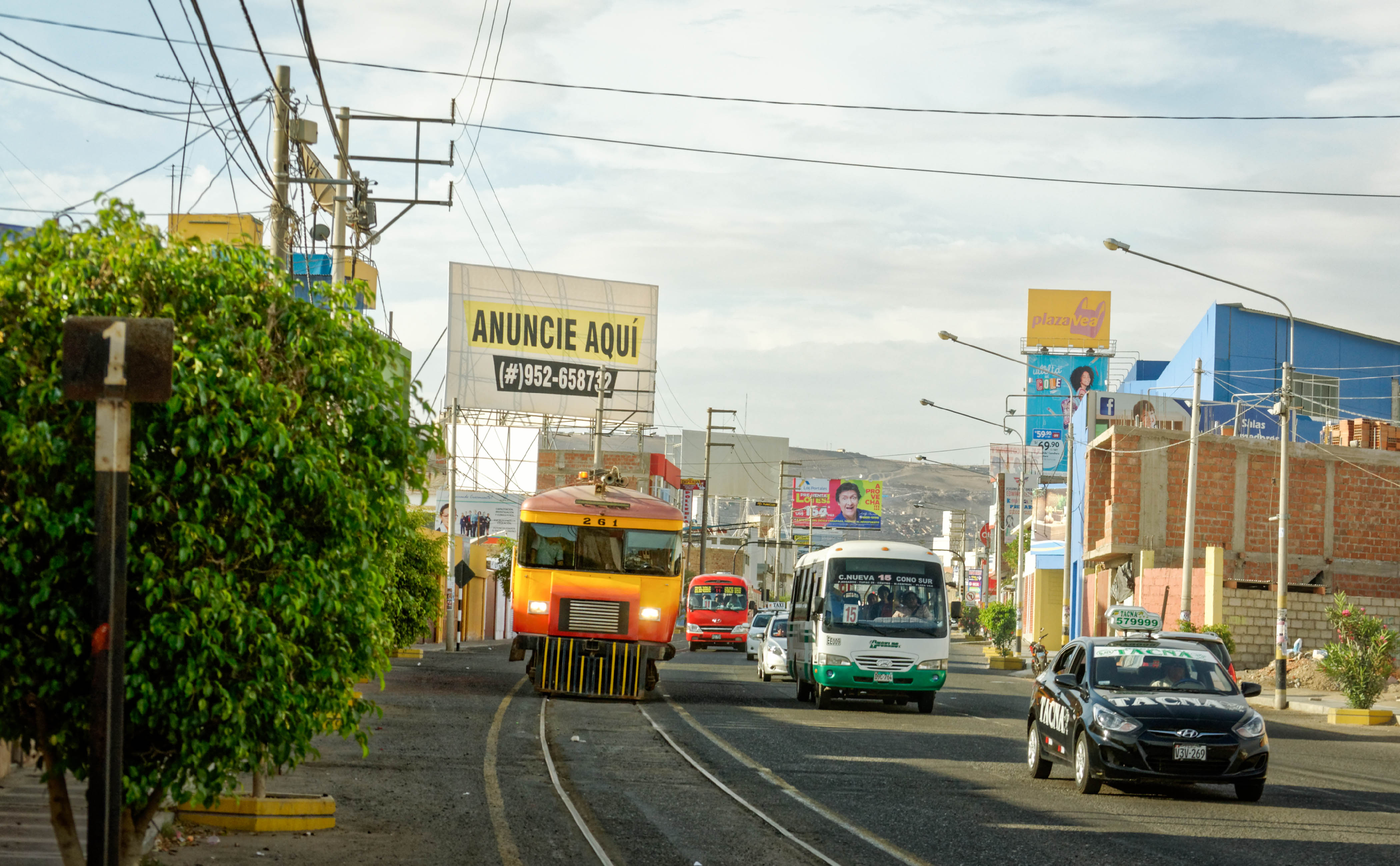 Luego de estar unos días en Arica, decidimos pasarnos a Tacna, ciudad en donde nos debíamos algunas fotos de este Ferrocarril, que es muy interesante para nosotros, ya que es el único servicio ferroviario internacional de pasajeros activo en estos momentos en nuestro país. Cae la tarde y el "segundo turno" como le llaman en Peru, hace su pasada por la transitada Av. Municipal de Tacna,en donde vemos como los diversos medios de transporte acompañan al viejo Sentinel a la altura del km. 1 del Antiguo FC TACNA - ARICA, antiguamente dependiente del FFCC DEL SUR de la ENAFER PERU. Tacna, Febrero 2017